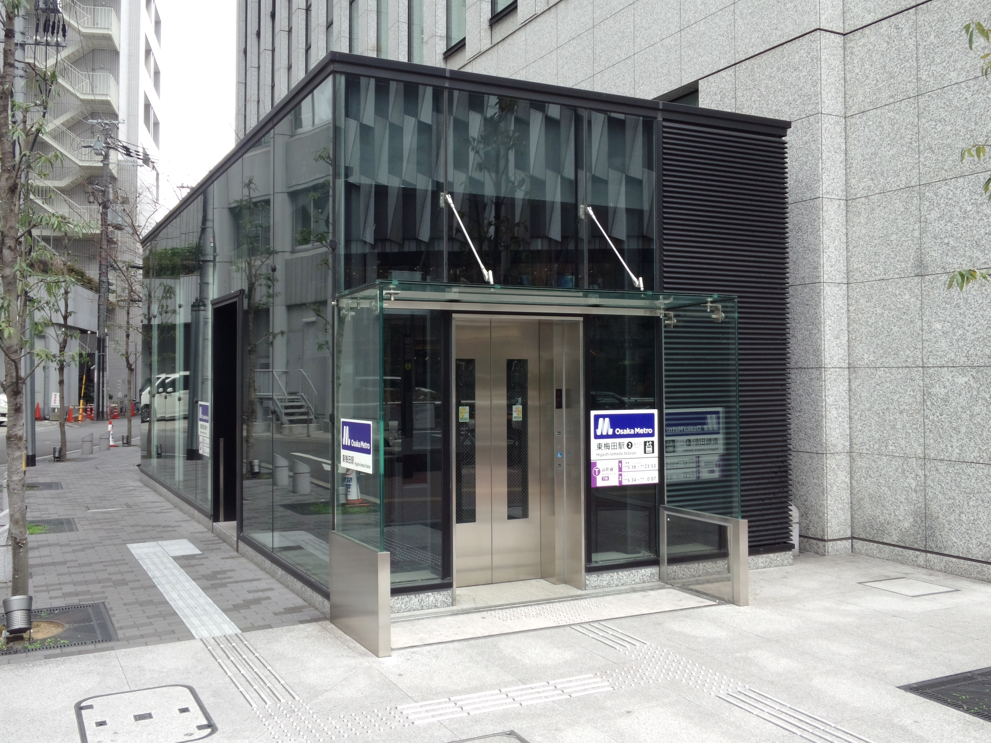 大阪府大阪市にある東梅田駅の2号エレベータのりば。Osaka Metro谷町線が乗り入れている。